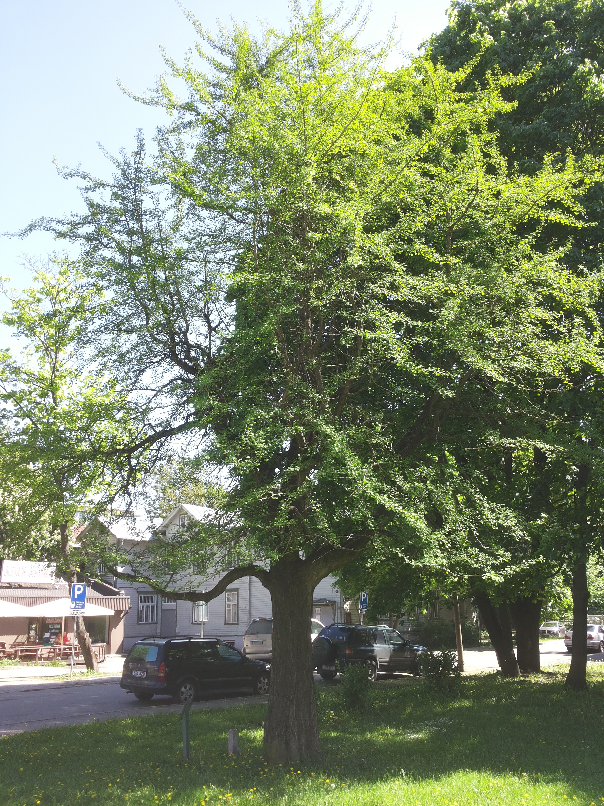 Hõlmikpuu